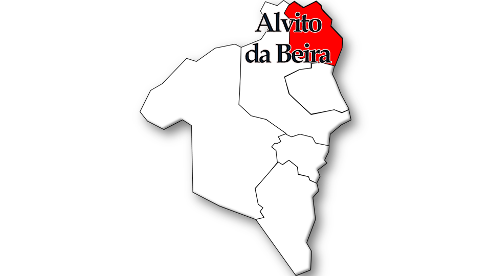 População